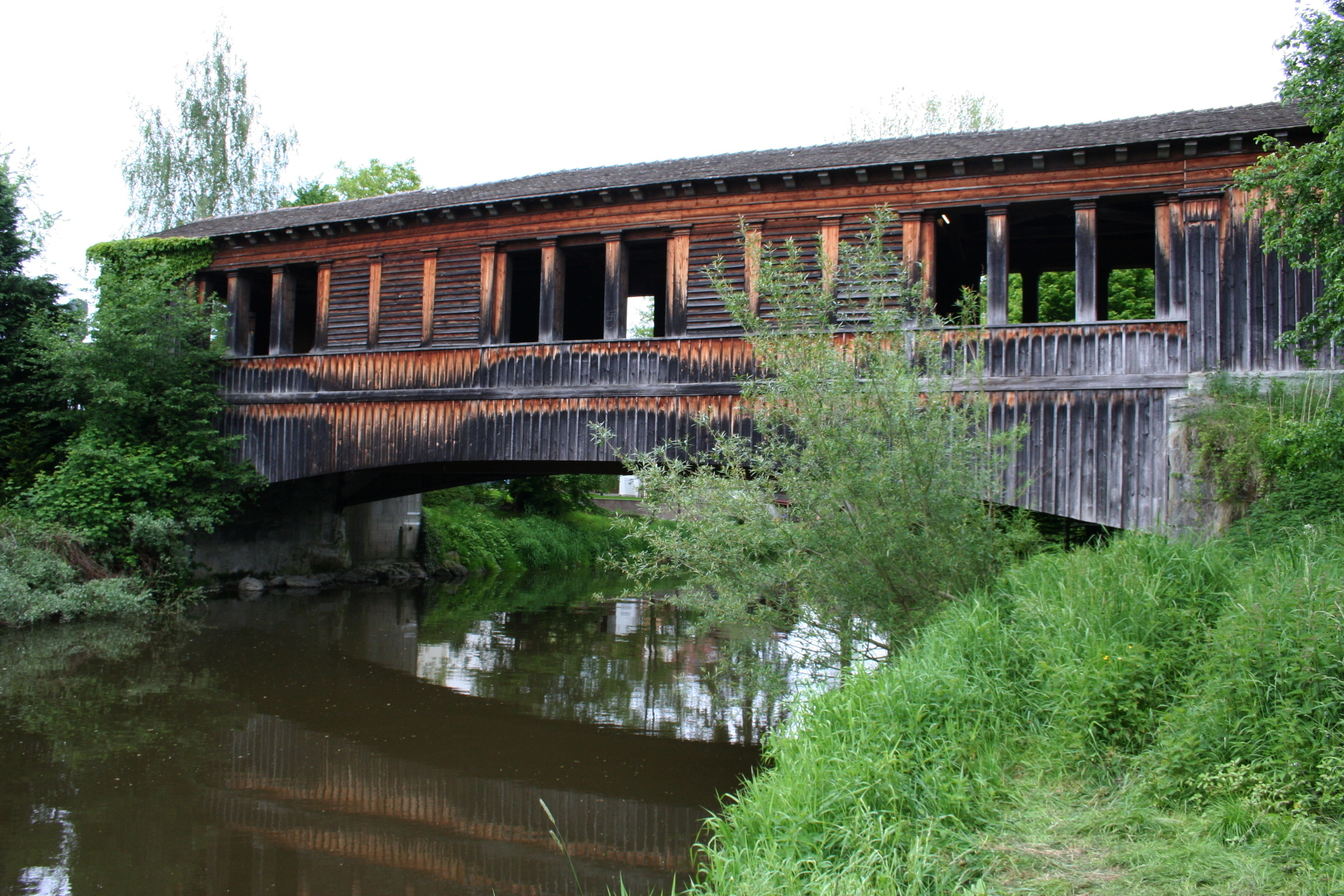 1828 erbaute und 1984/1985 restaurierte, unter Denkmalschutz stehende, gedeckte Holzbrücke über den Fluss Schussen in Eriskirch.